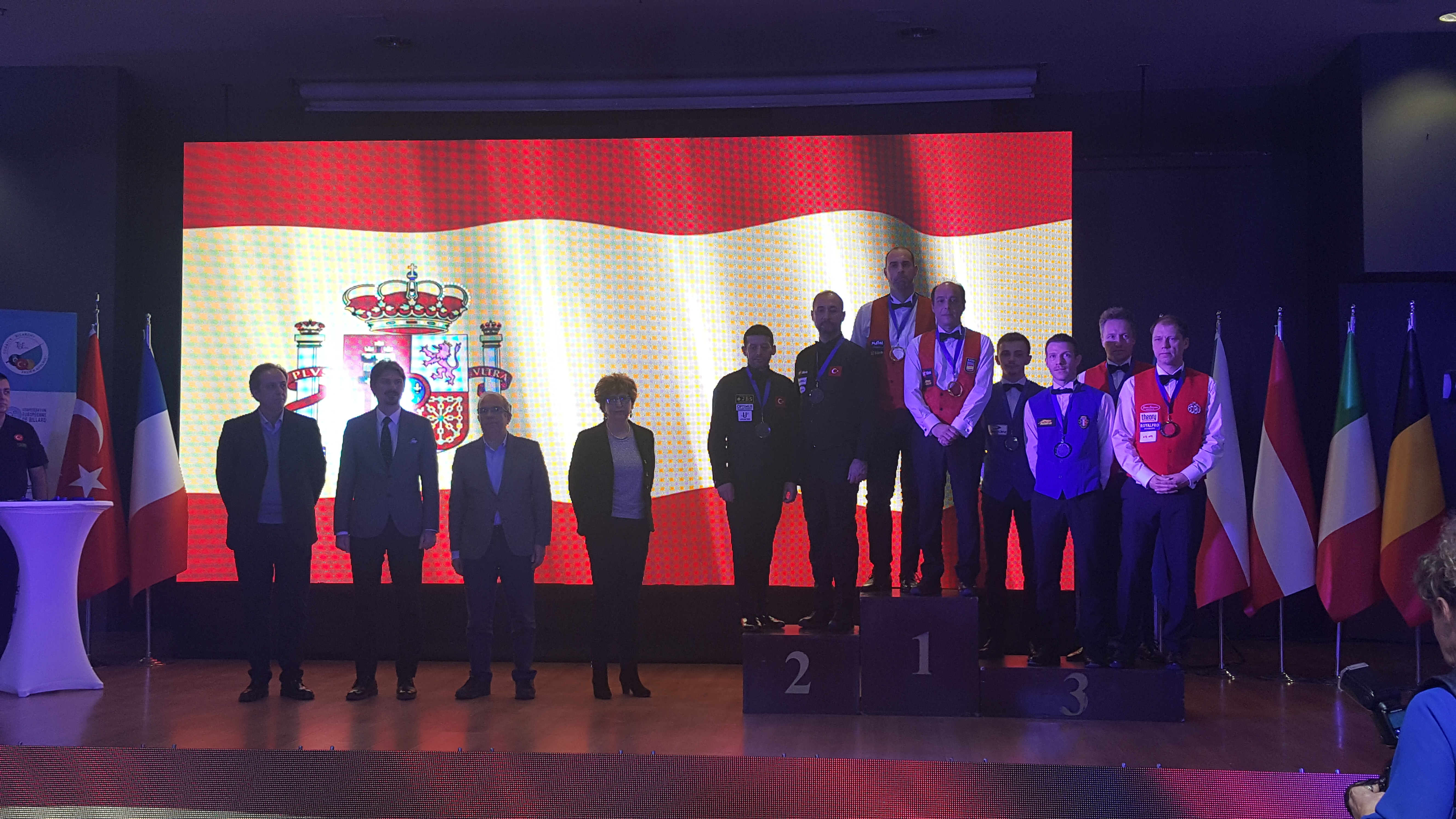 Siegerehrung beim Dreiband-Weltcup 2020/1 in Antalya. Links neben Siegertreppchen: Diane Wild, CEB-Präsidentin